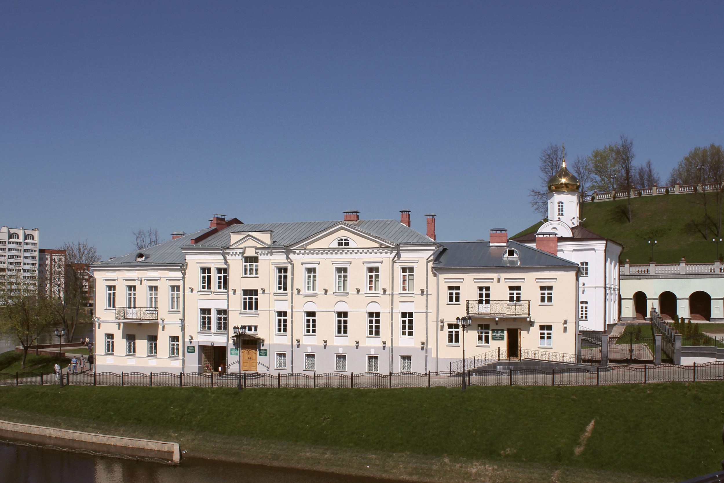 Свято-Духов женский монастырь и церковь. Витебск.